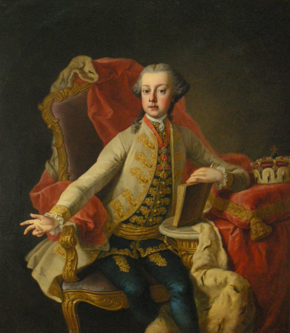 Archduke Joseph (1741-1790) (the later emperor) or his brother Archduke Karl Joseph (1745-1761